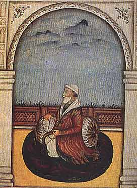 Raja Dina Nath